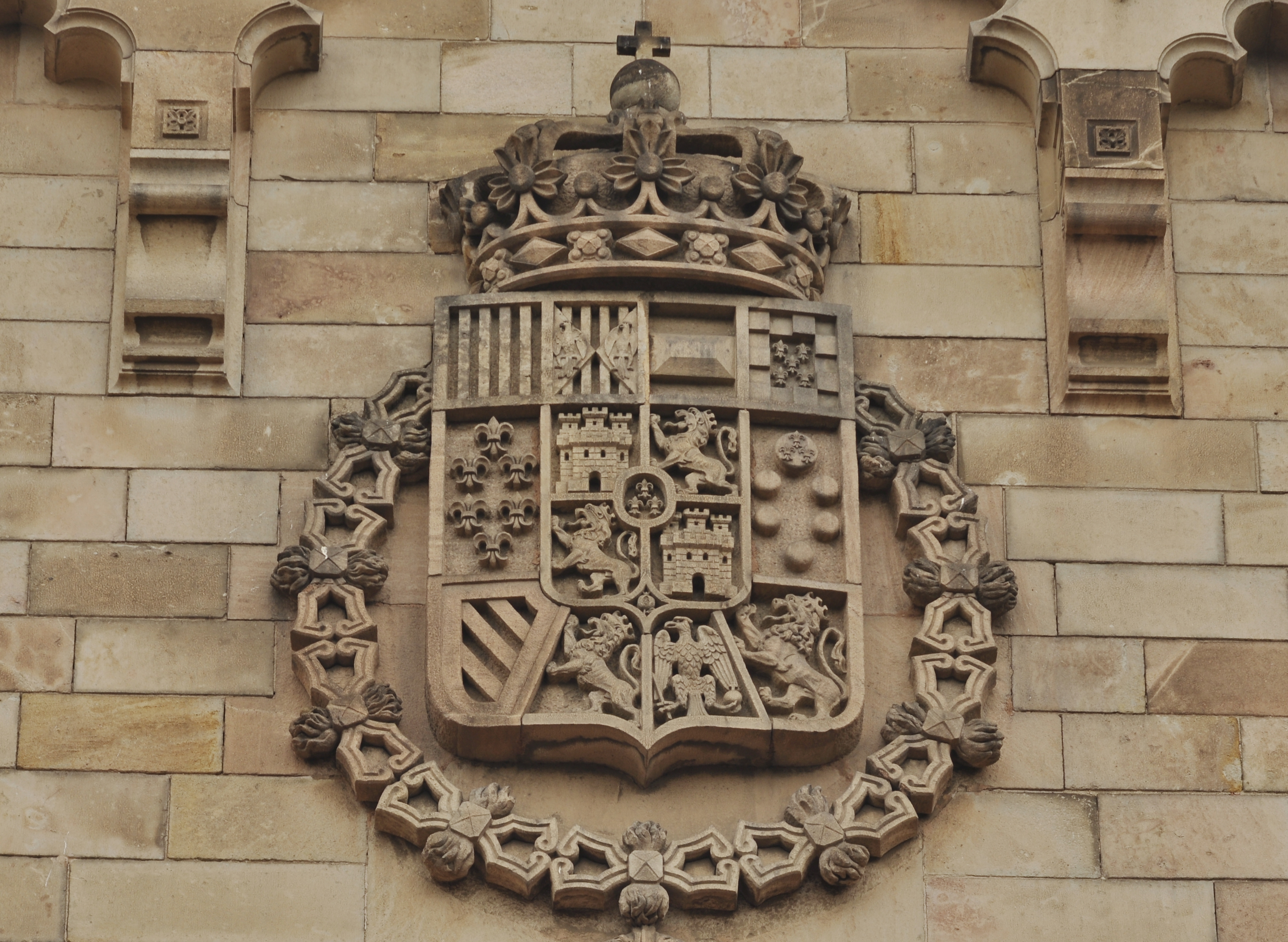 rarara